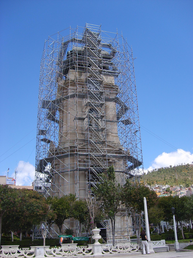 Por cierto, no se si tenga nombre este reloj. Se encuentran unas victorias y un 1810 grabado. El reloj es visible desde los 4 puntos cardinales.